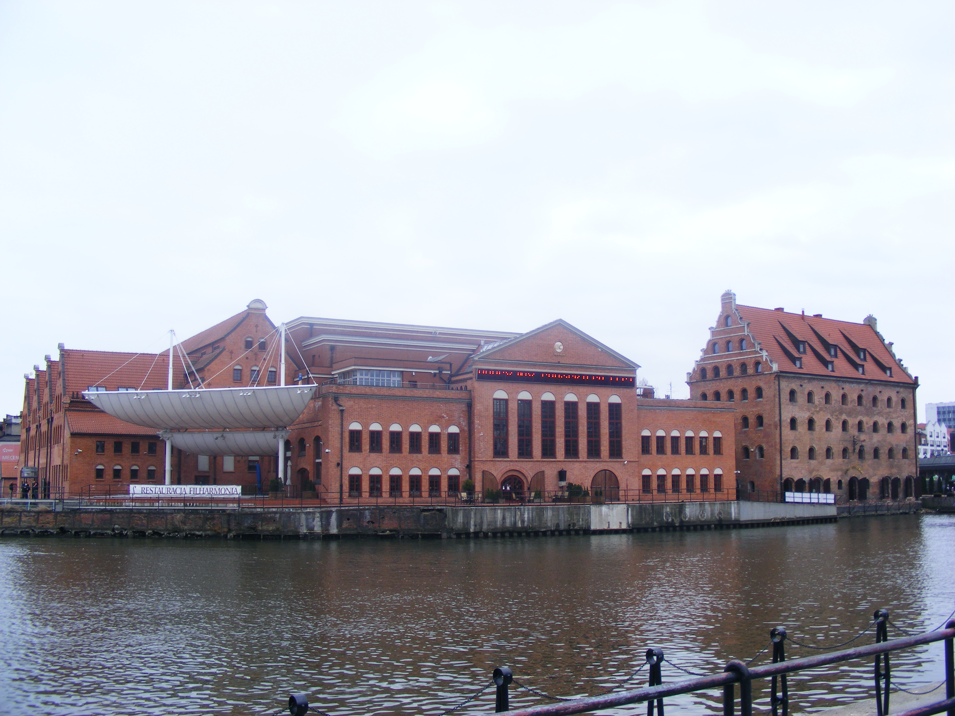 Filharmonia Bałtycka.